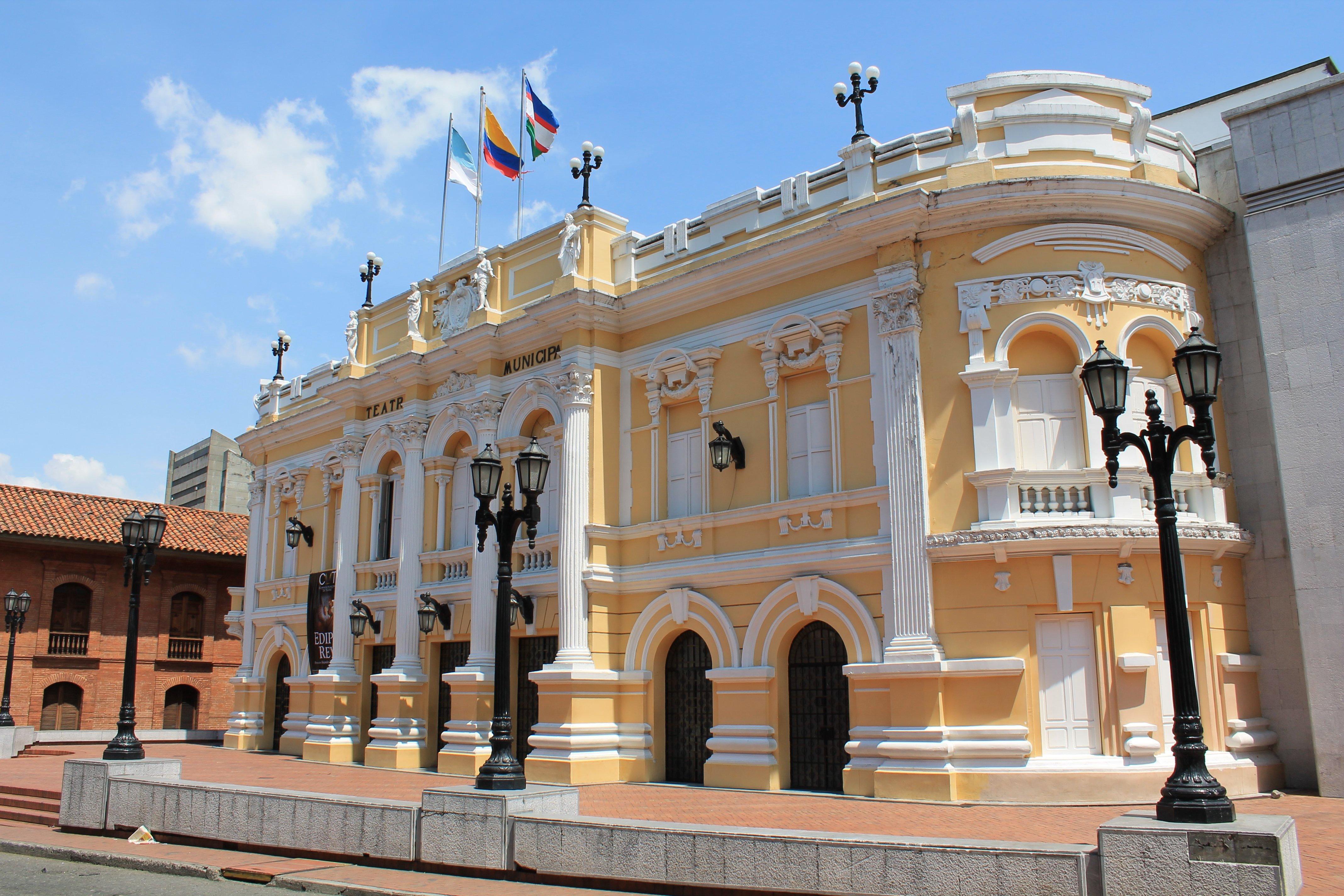 Teatro Municipal de Santiago de Cali